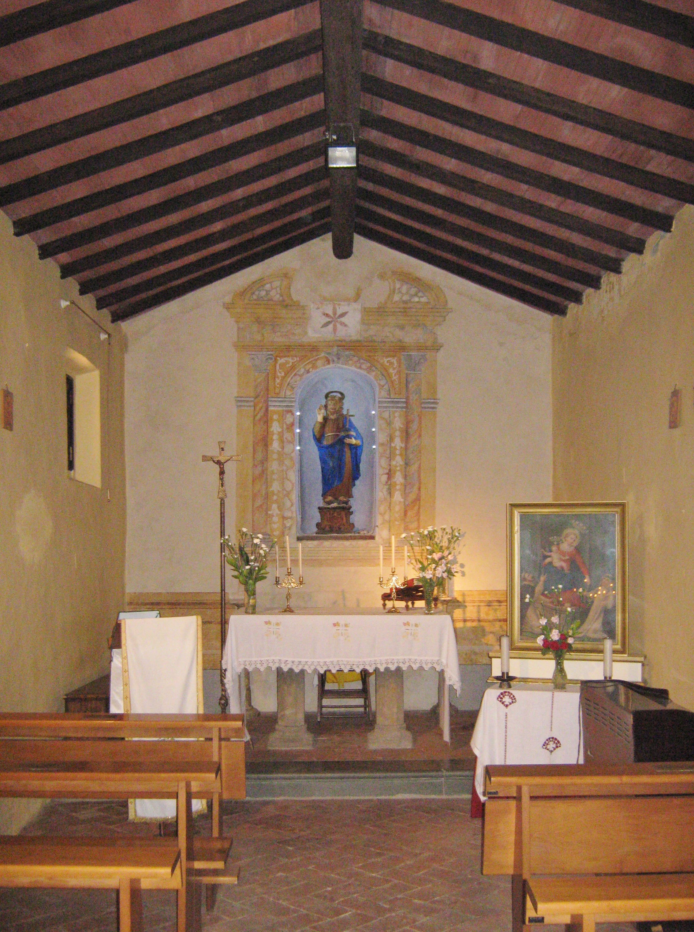 La Sassa, frazione di Montecatini Val di Cecina: interno dell'oratorio del Redentore.